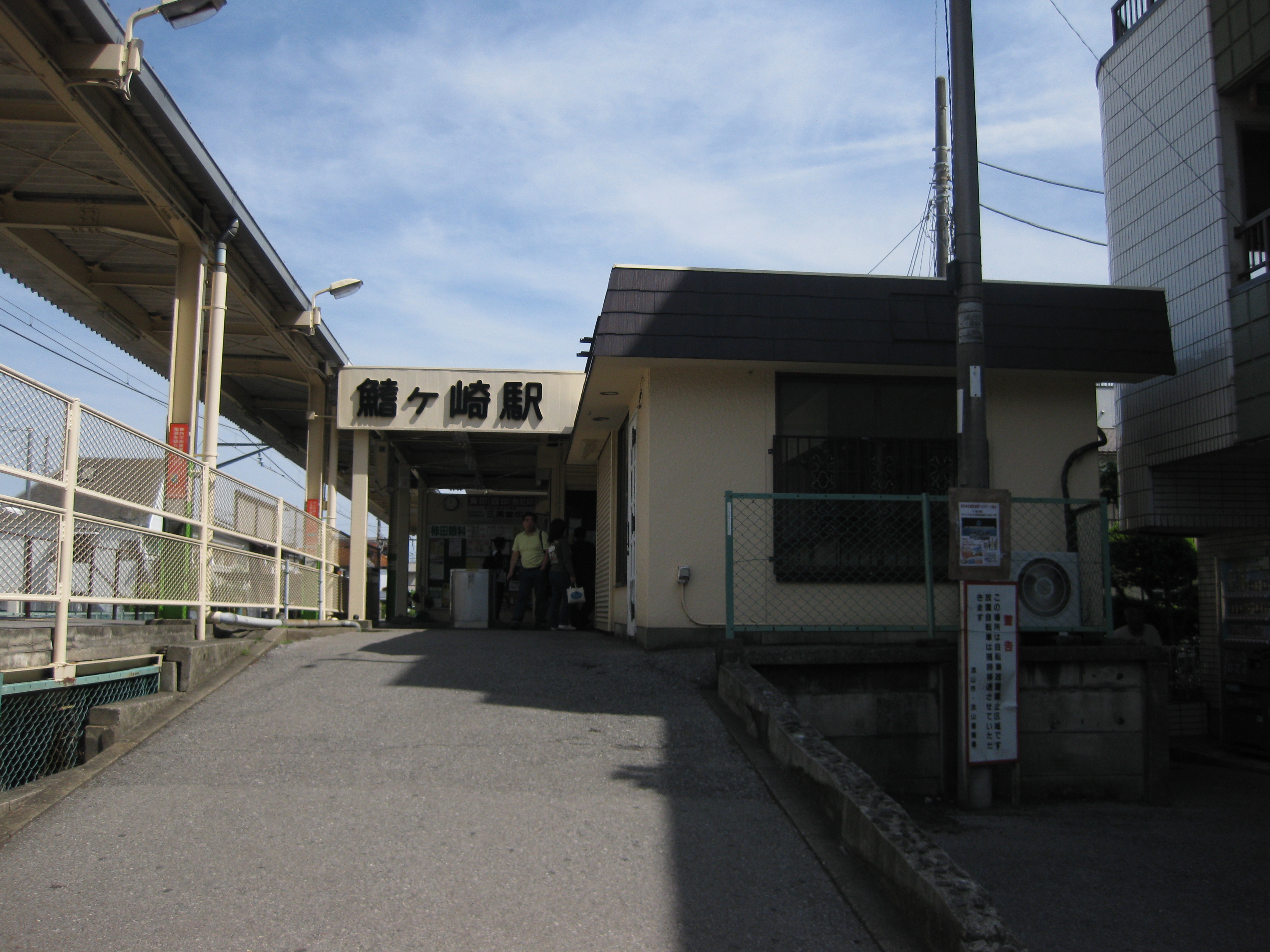 鰭ヶ崎駅前にて撮影